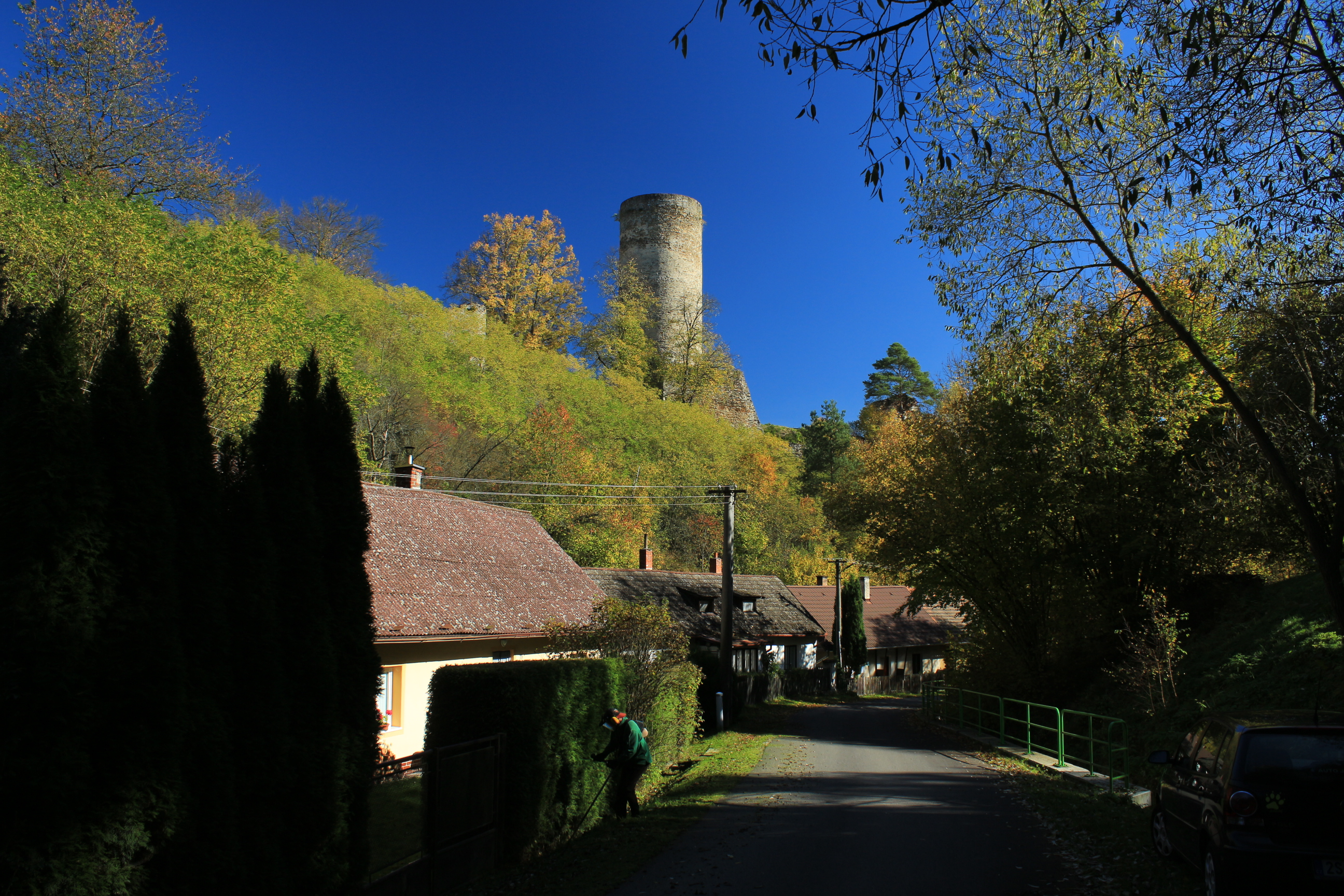 Dobronice, hrad